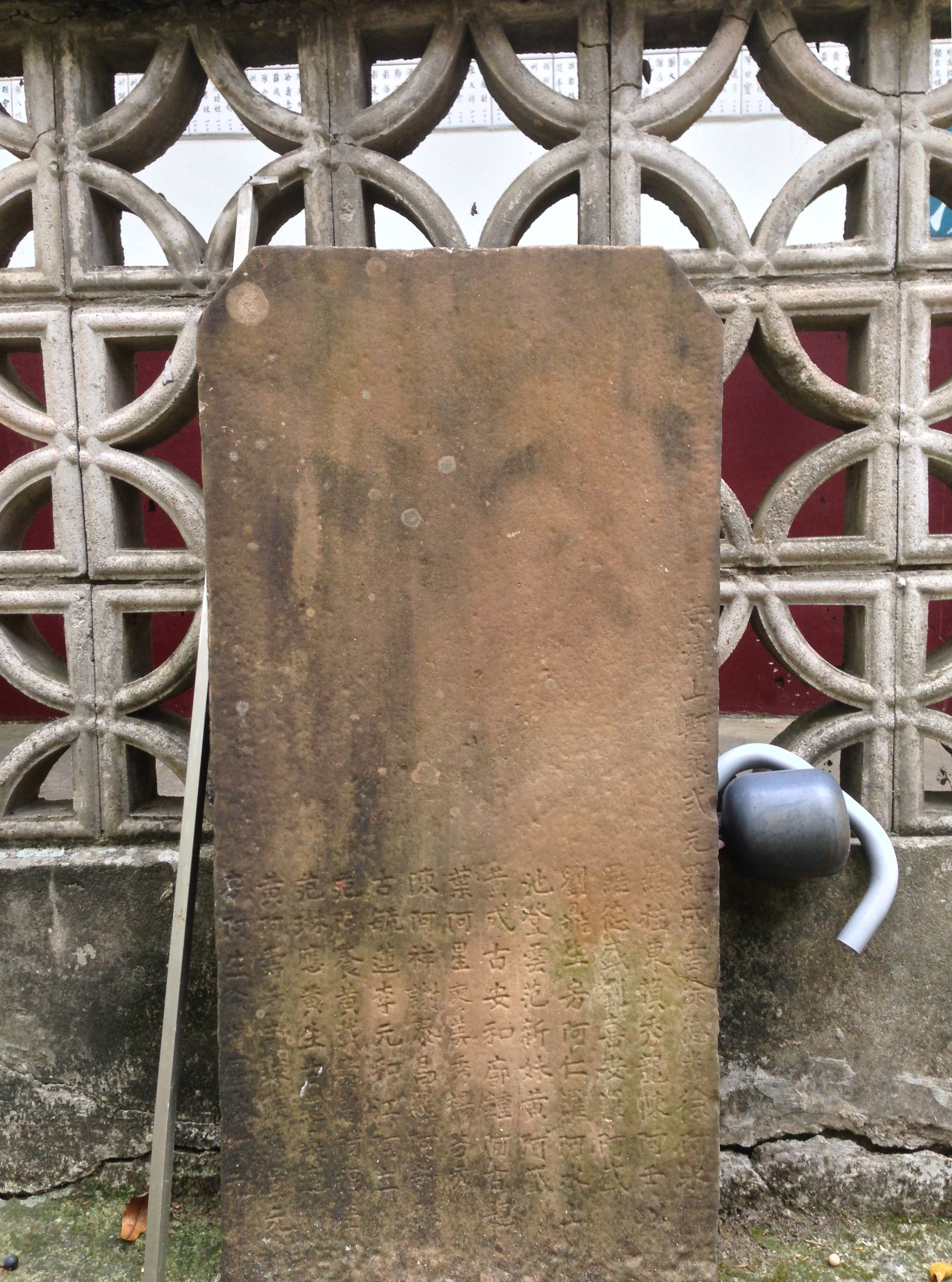 中文（台灣）: 永春宮捐題碑